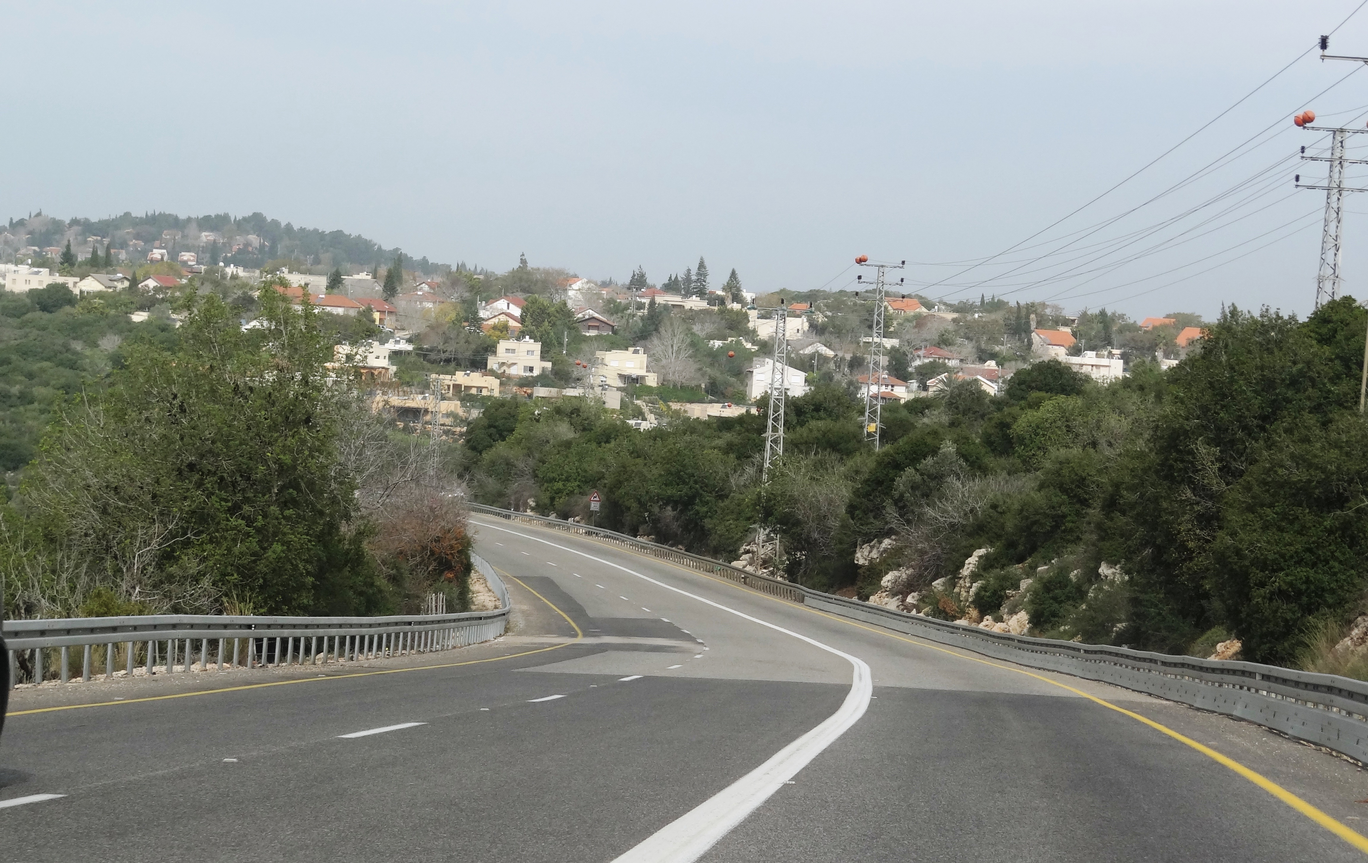 מבט על רקפת מכביש 784